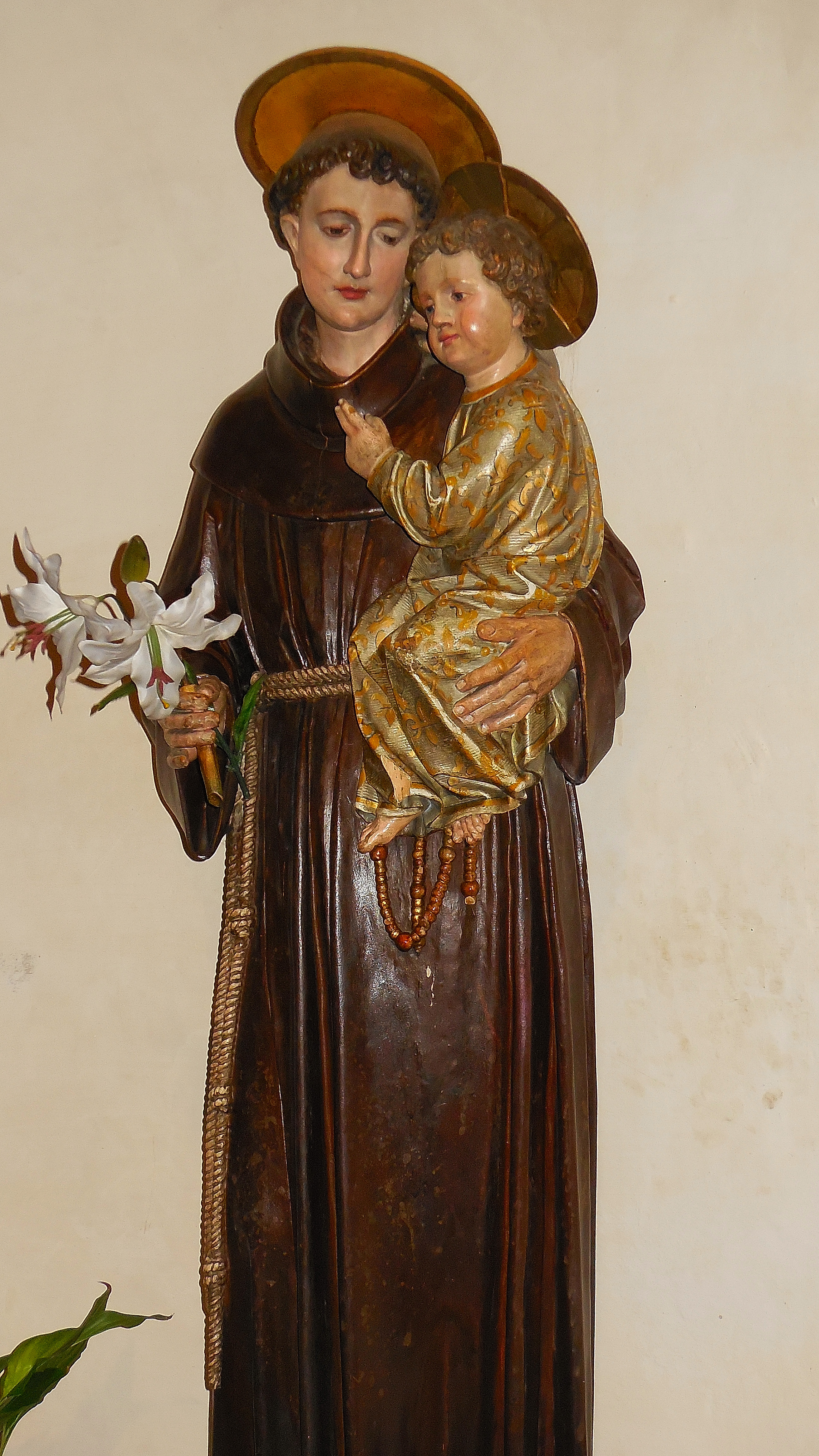 Stadtpfarrkirche Zum Hl. Blut